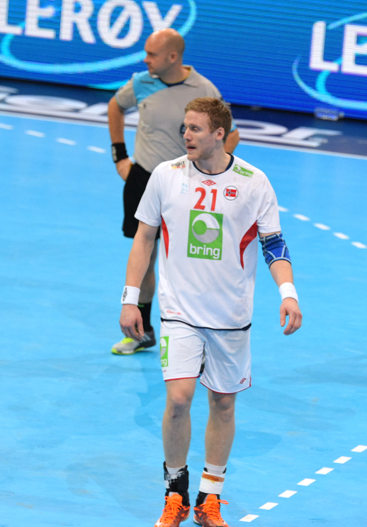 Le 10 janvier 2016 lors du match Norvège / Qatar durant la Golden League à l'AccordHotel Arena (Paris). Magnus Gullerud